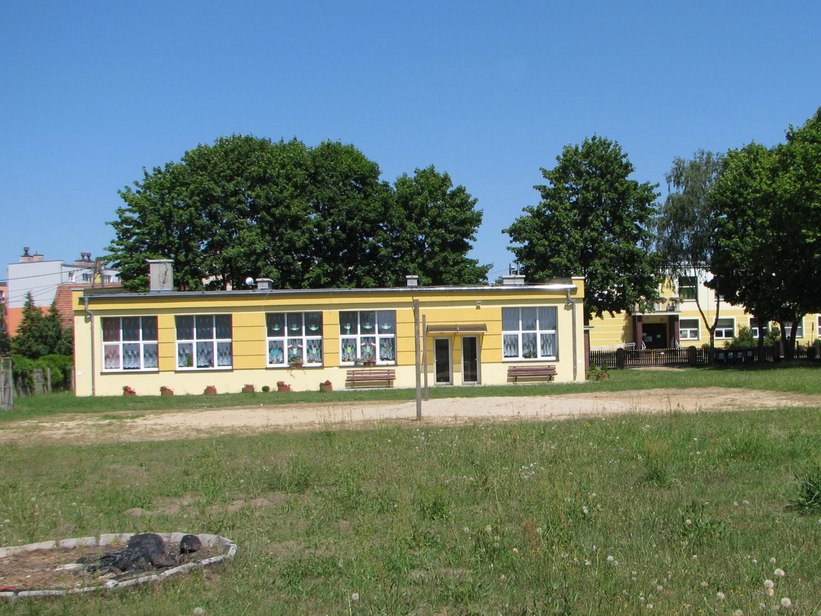 Wojcieszyce. Budynek świetlicy.